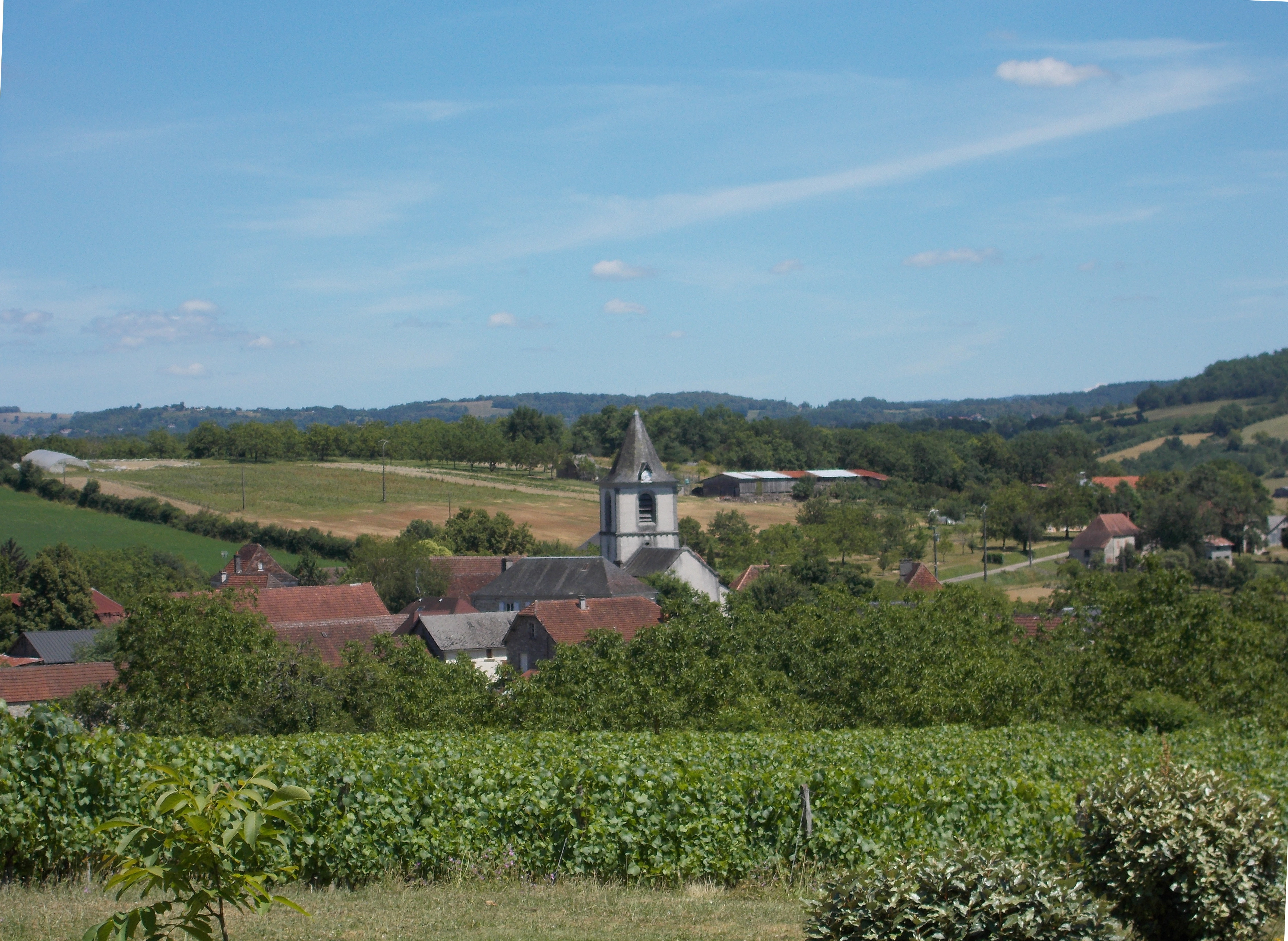 Branceilles